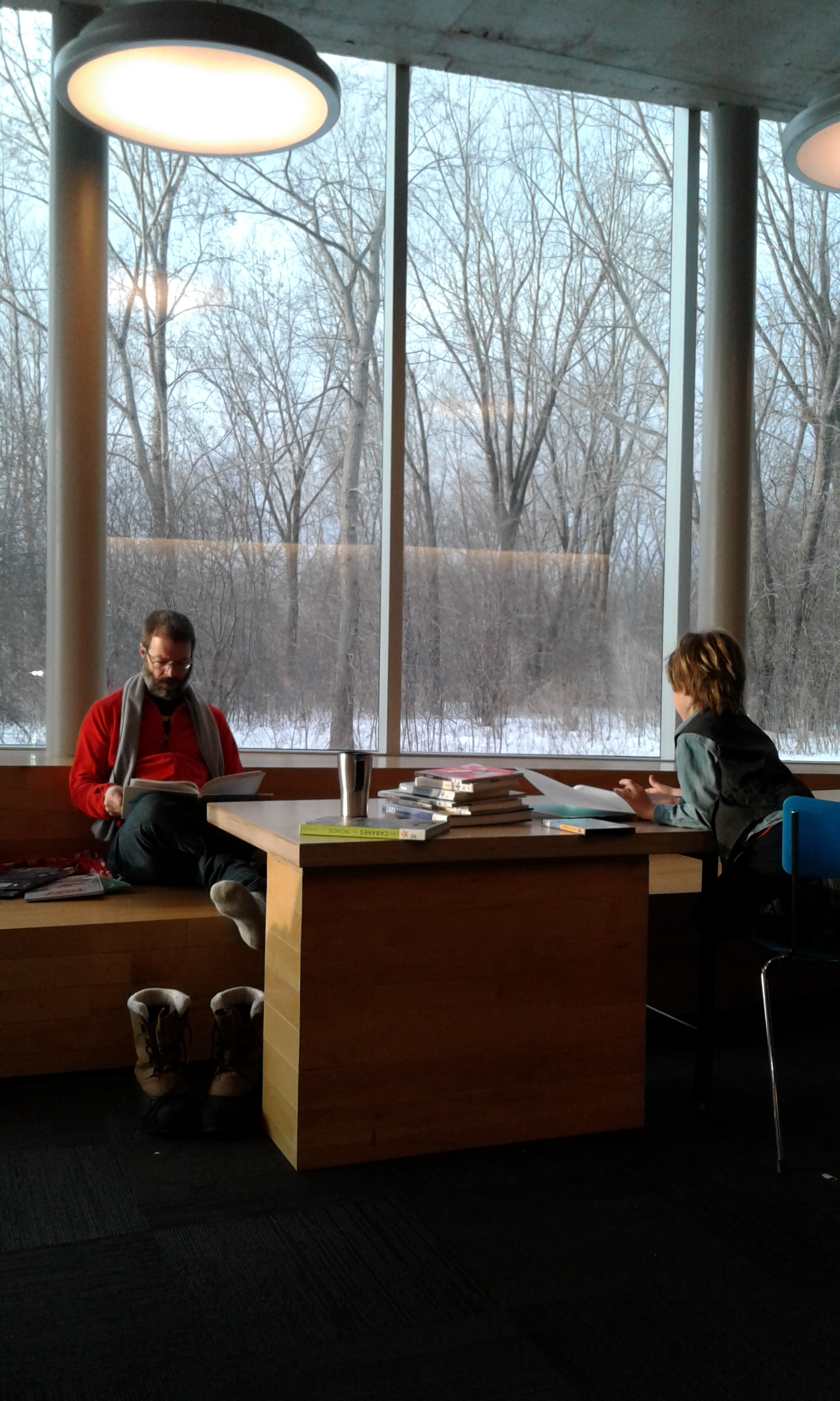 Bibliothèque Du Boisé à Montréal, Québec, Canada (troisième lieu)